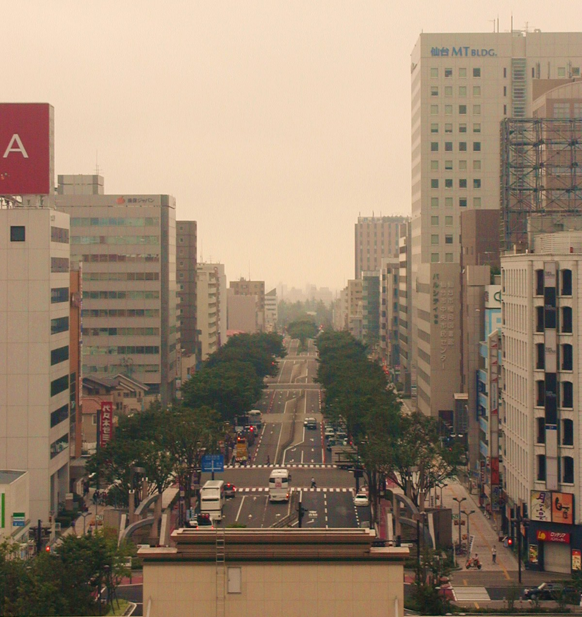 JR仙台駅屋上駐車場から撮影した宮城野通